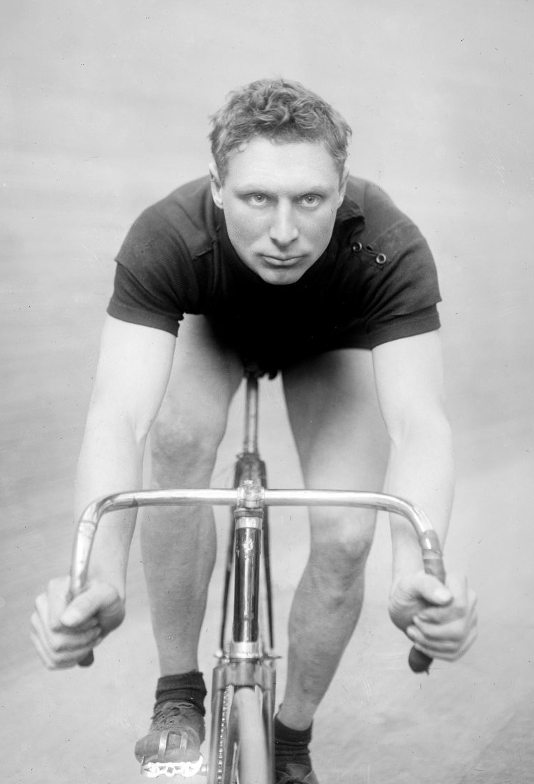 [Piet] Moeskops [coureur cycliste néerlandais participant au meeting de la Toussaint, 1er novembre 1919] : [photographie de presse] / [Agence Rol]